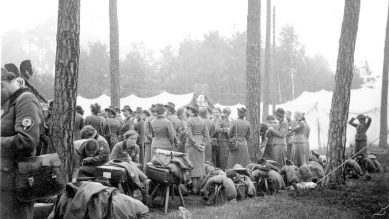 Wieder Abmarsch und Rücktransport am 30.8.39 (?)